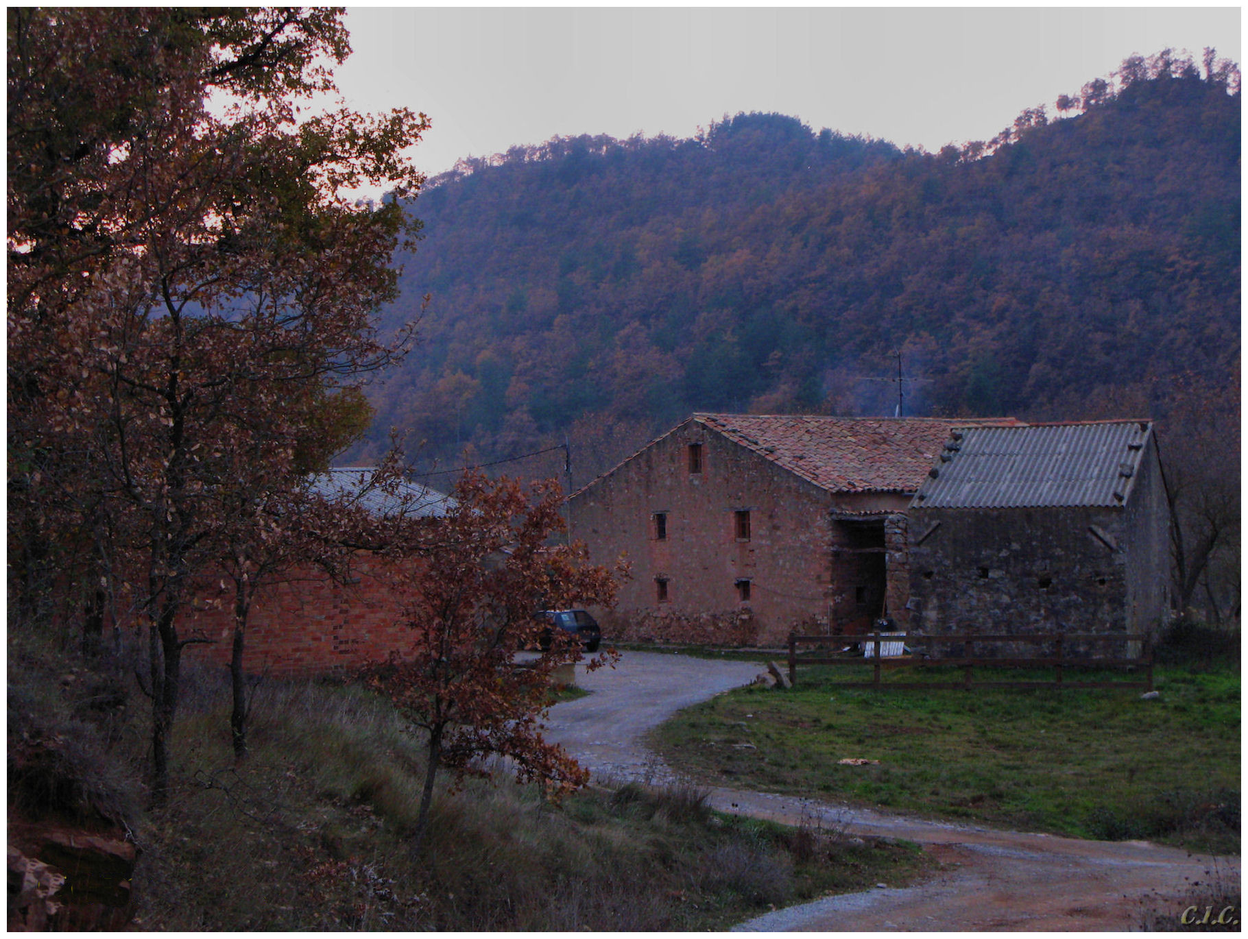 Casa de pagés del terme de Moià